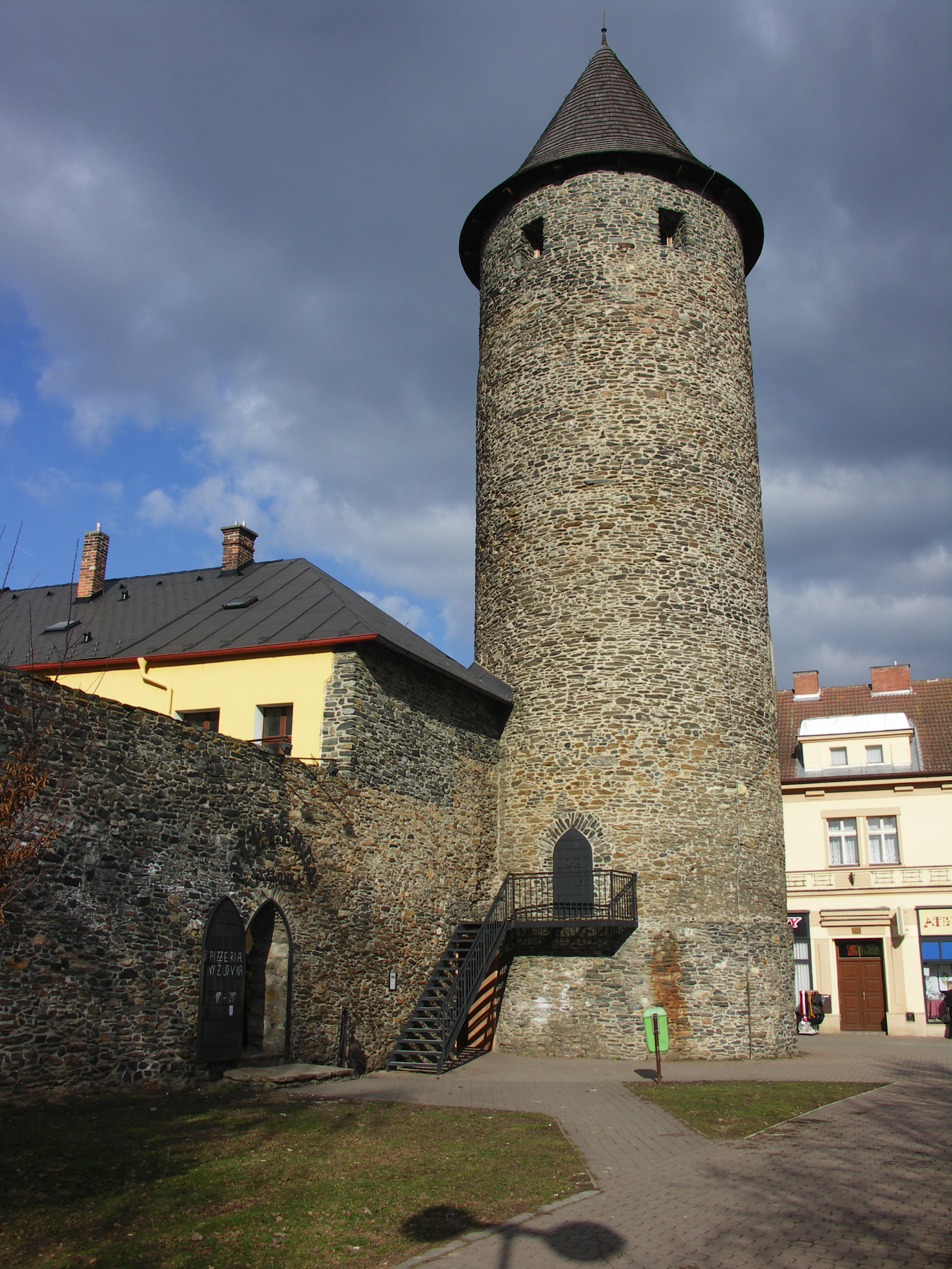 Městské opevnění (Čáslav), Čáslav